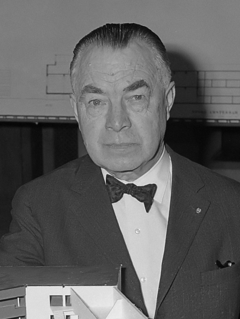 Definitief ontwerp Operagebouw Amsterdam. Architect ir. B. Bijvoet bij zijn maquette 21 februari 1963